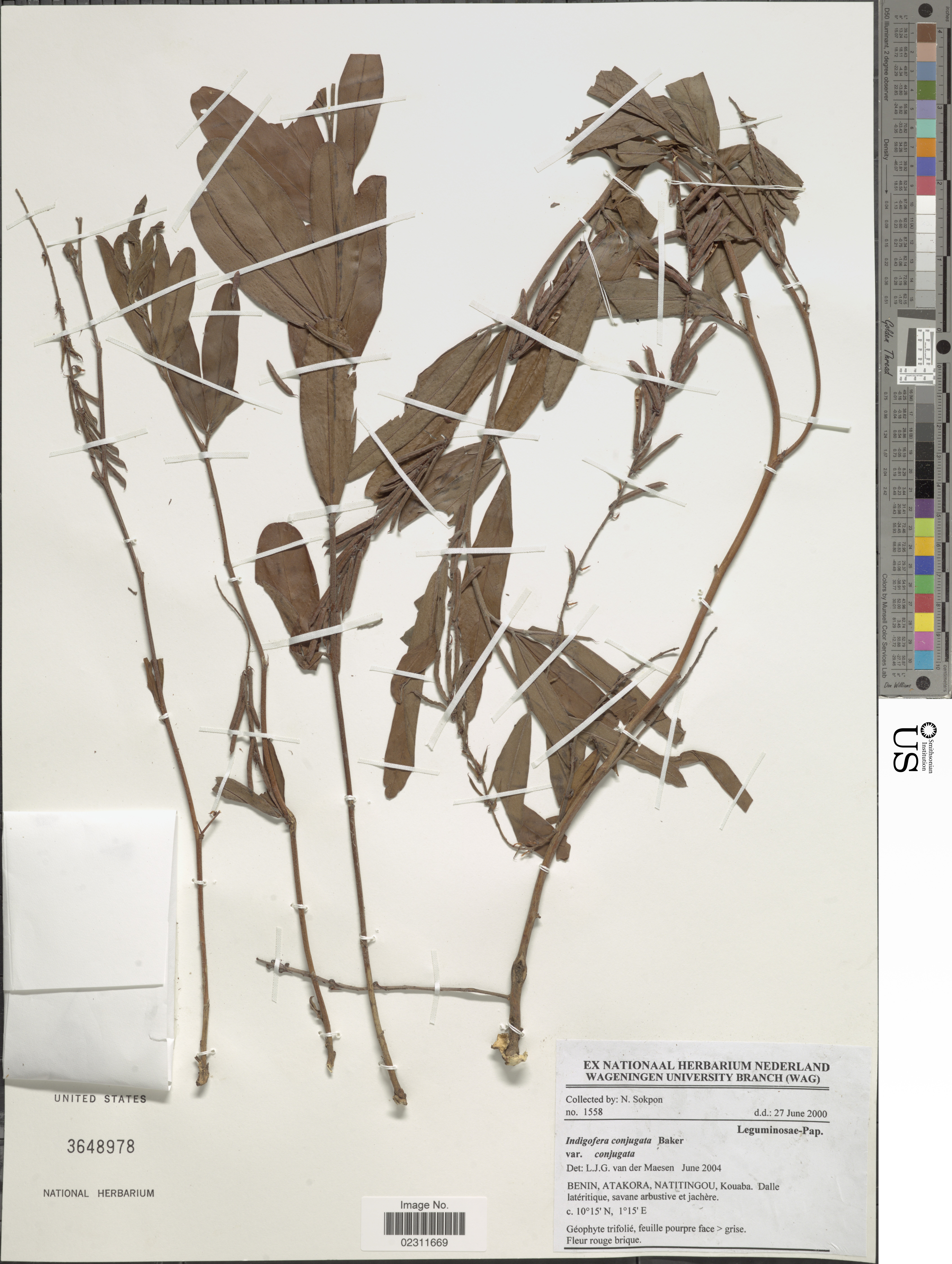 Indigofera conjugata Baker Object Details Biogeographical Region 22 - West Tropical Africa Collector N. Sokpon Record Last Modified 3 Jan 2018 Specimen Count 1 Collection Date 27 Jun 2000 Barcode 02311669 USNM Number 3648978 Place Natitingou, Kouaba, Atakora, Benin, Africa Published Name Indigofera conjugata Baker Taxonomy Plantae Dicotyledonae Rosales Fabaceae Faboideae NMNH - Botany Dept. Record ID nmnhbotany_13322787 Usage of Metadata (Object Detail Text) CC0 GUID (Link to Original Record)